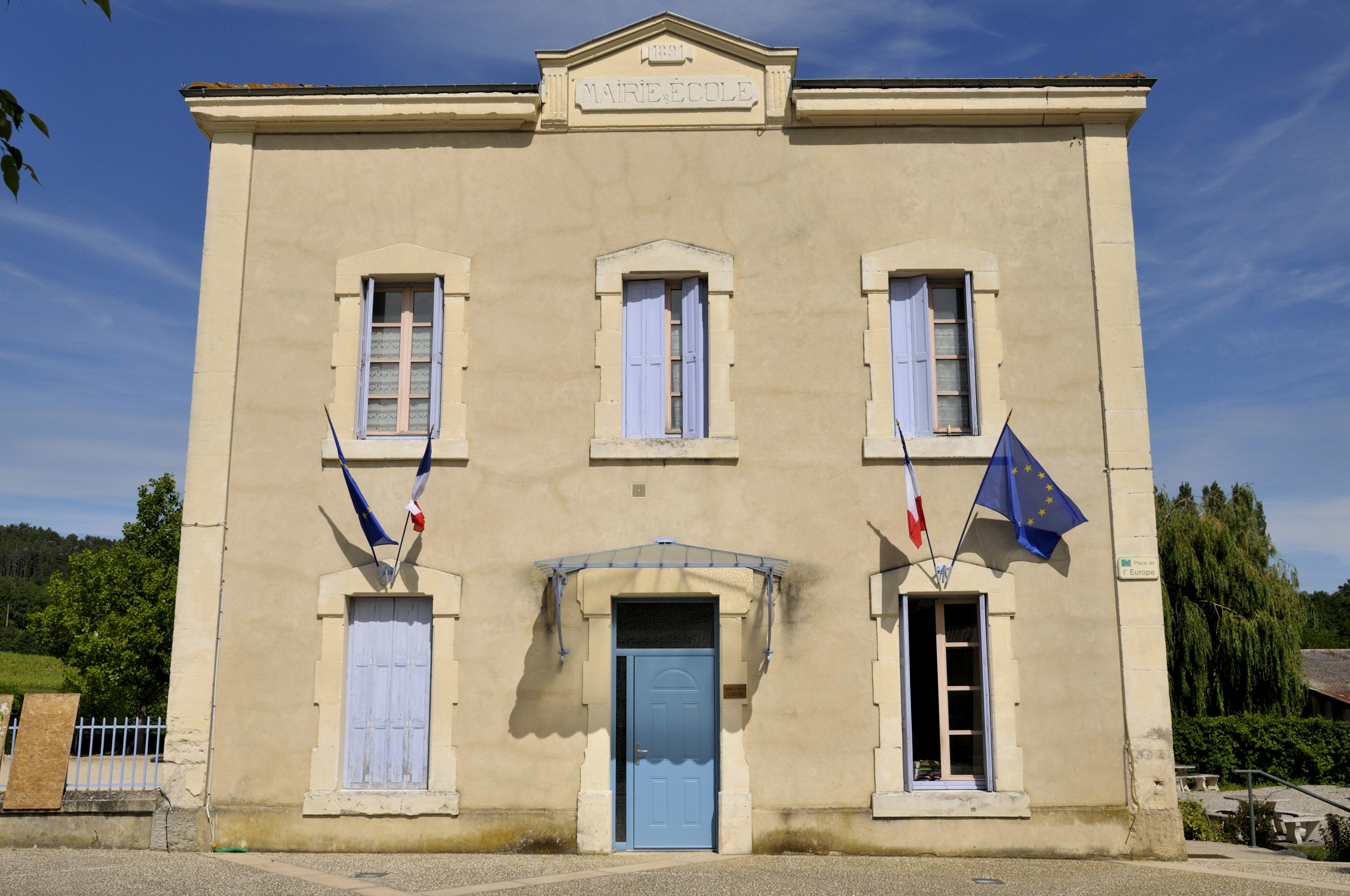 la mairie